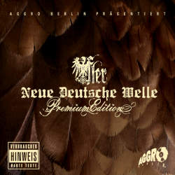 Cover des Albums „Neue Deutsche Welle“ (Special Edition)